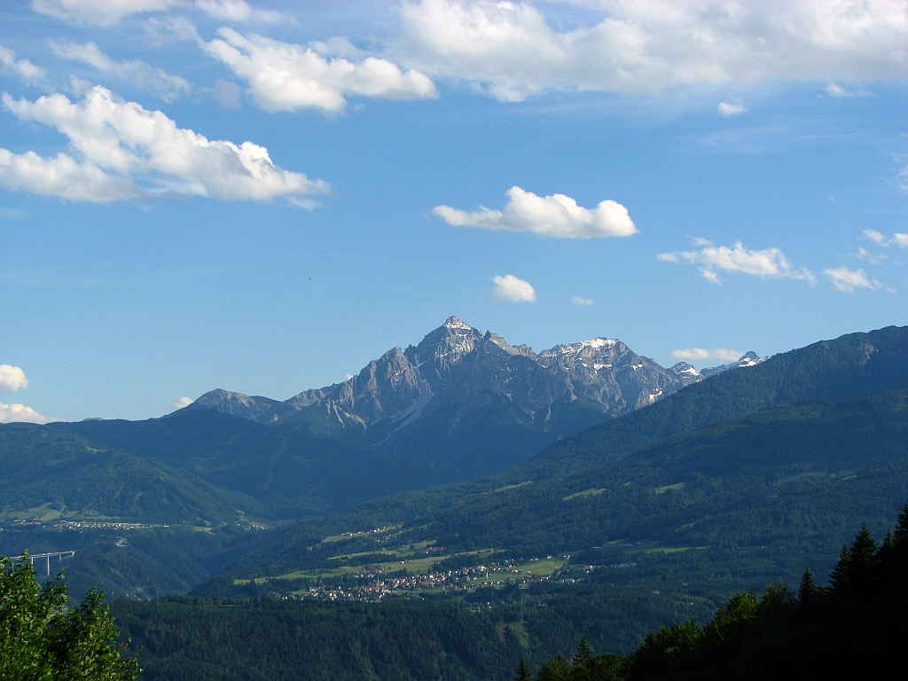 Die Serles aus dem Höttinger Graben (Innsbruck)